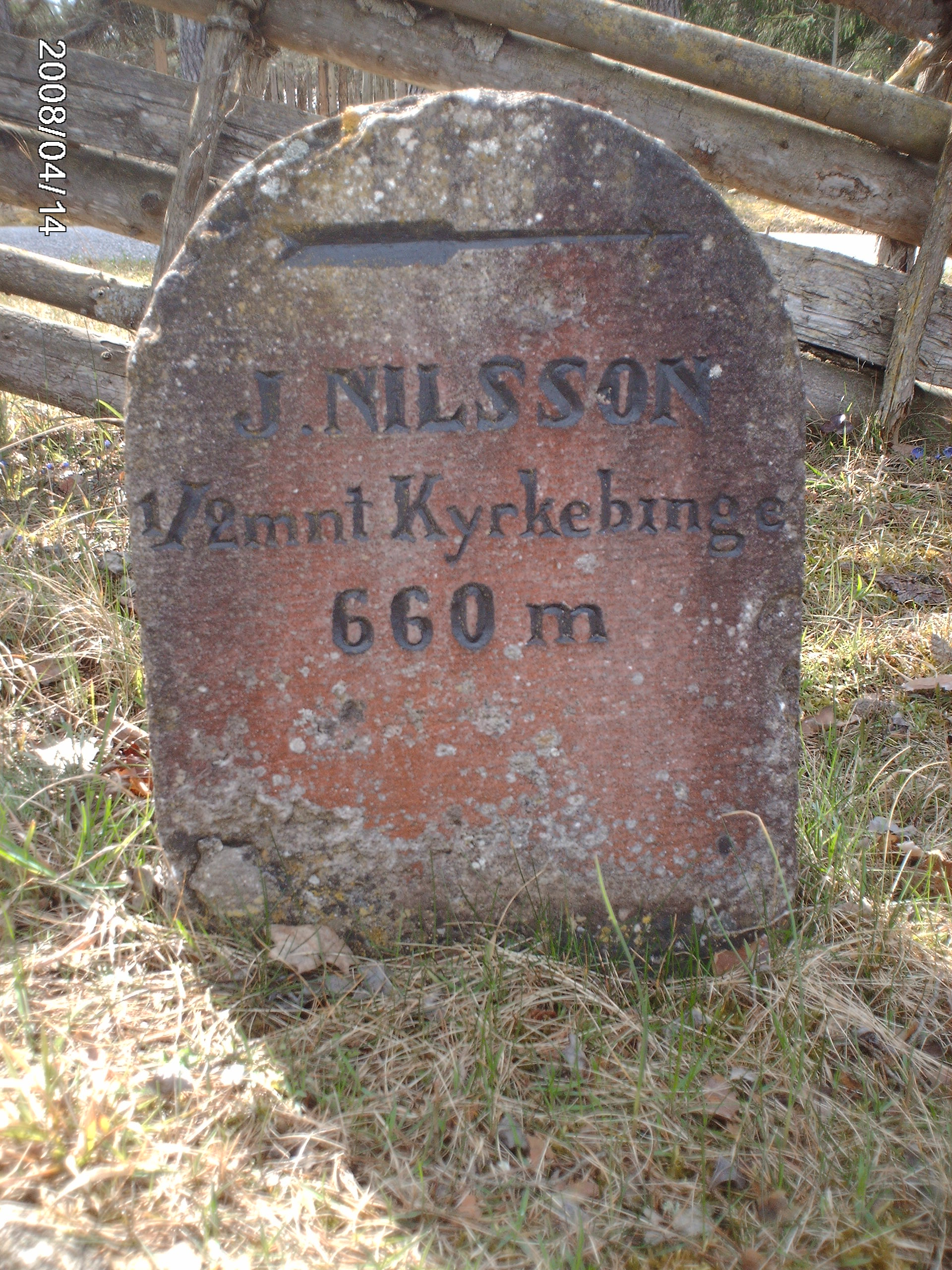 Väghållningssten, Gotland, Sweden